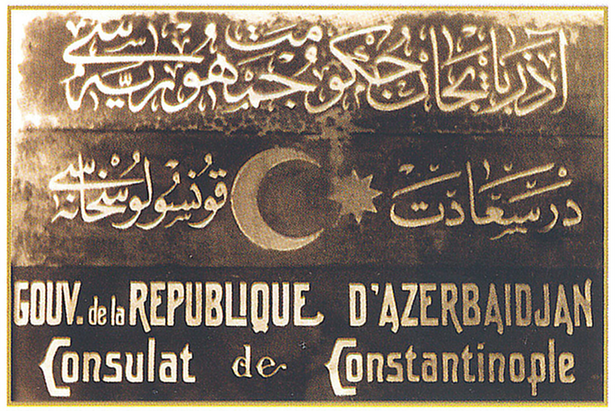 Cümhuriyyətin Osmanlı səfirliyi